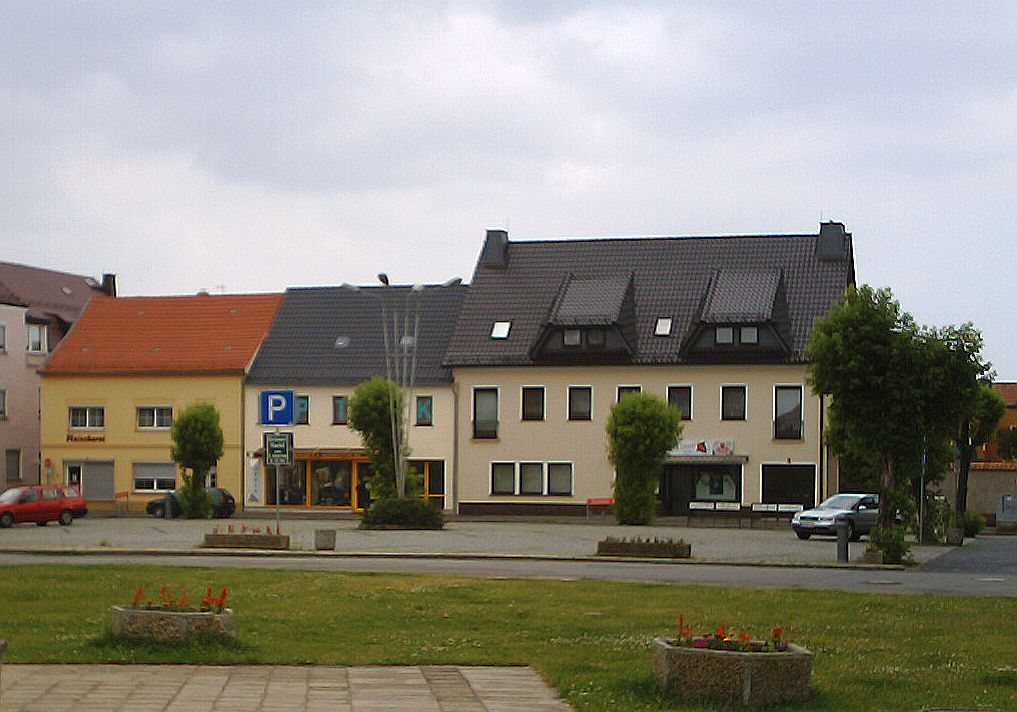 Alter Marktplatz in Elsterwerda.